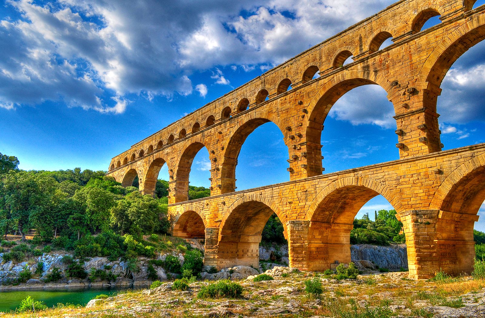 This building is en partie classé, en partie inscrit au titre des Monuments Historiques. .